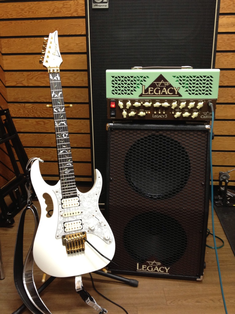 CARVIN LEGACY 3 & Ibanez JEM7V — Steve Vai set